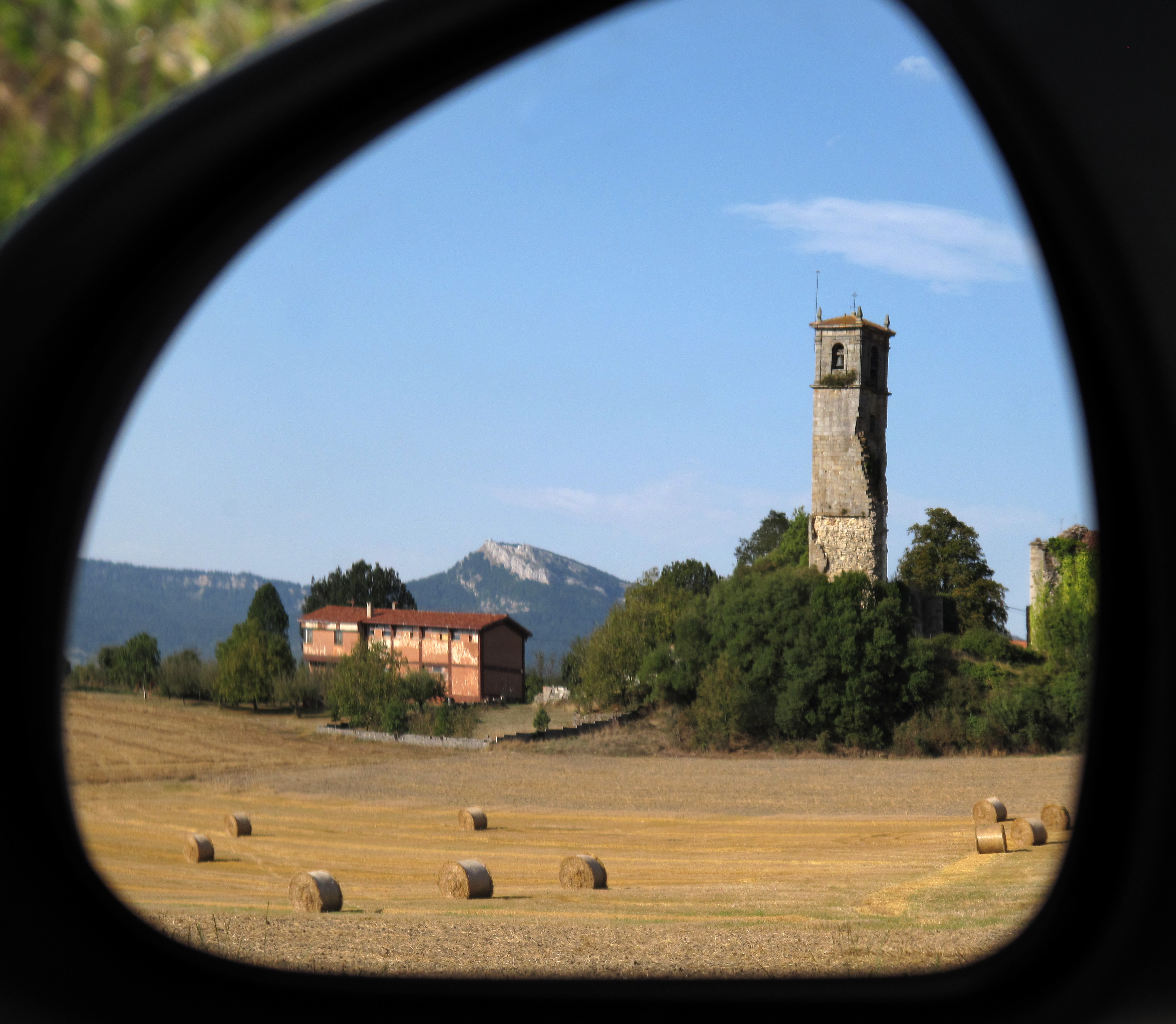 Pueblo de Galarreta (Álava) con la torre de su iglesia, que posteriormente se derrumbó, todavía en pie.